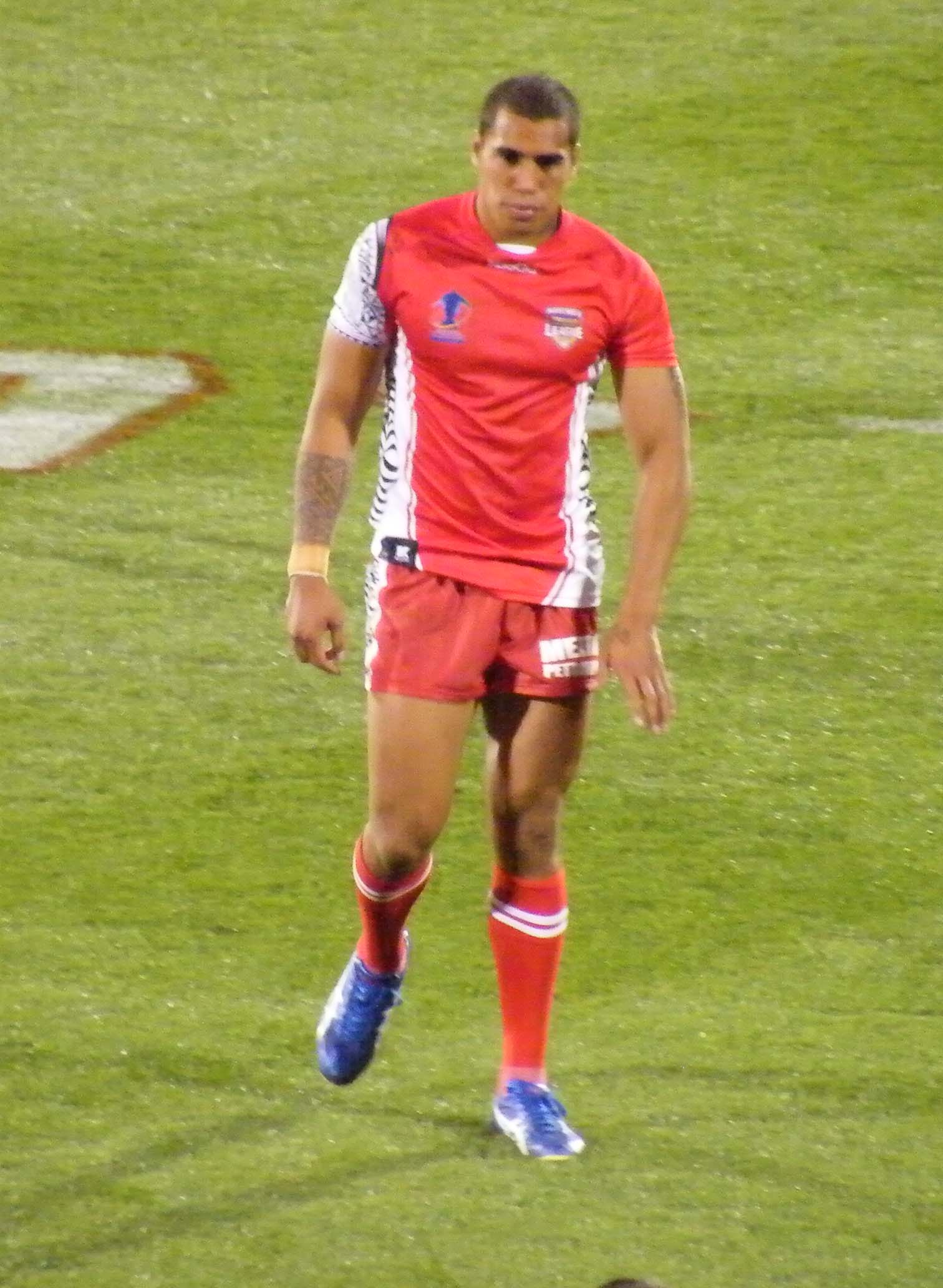 Tongan fullback Fetuli Talanoa. RLWC Samoa v Tonga, Penrith 2008.